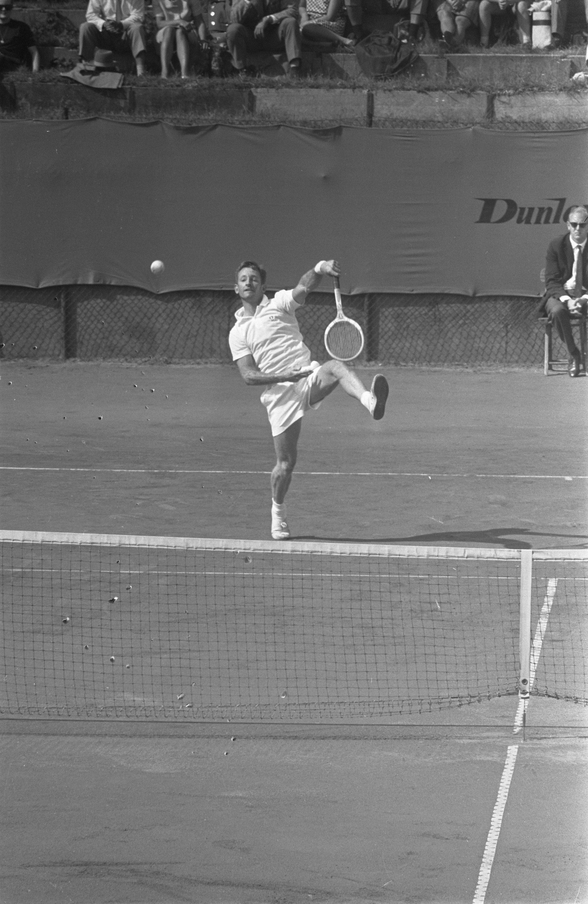 Collectie / Archief : Fotocollectie Anefo Reportage / Serie : [ onbekend ] Beschrijving : Tenniskampioenschappen in Noordwijk, Laver (Australie) in actie Datum : 20 augustus 1964 Locatie : Australië, Noordwijk Trefwoorden : kampioenschappen, tennis Persoonsnaam : Leaver Fotograaf : Gelderen, Hugo van / Anefo Auteursrechthebbende : Nationaal Archief Materiaalsoort : Negatief (zwart/wit) Nummer archiefinventaris : bekijk toegang 2.24.01.05 Bestanddeelnummer : 916-7881